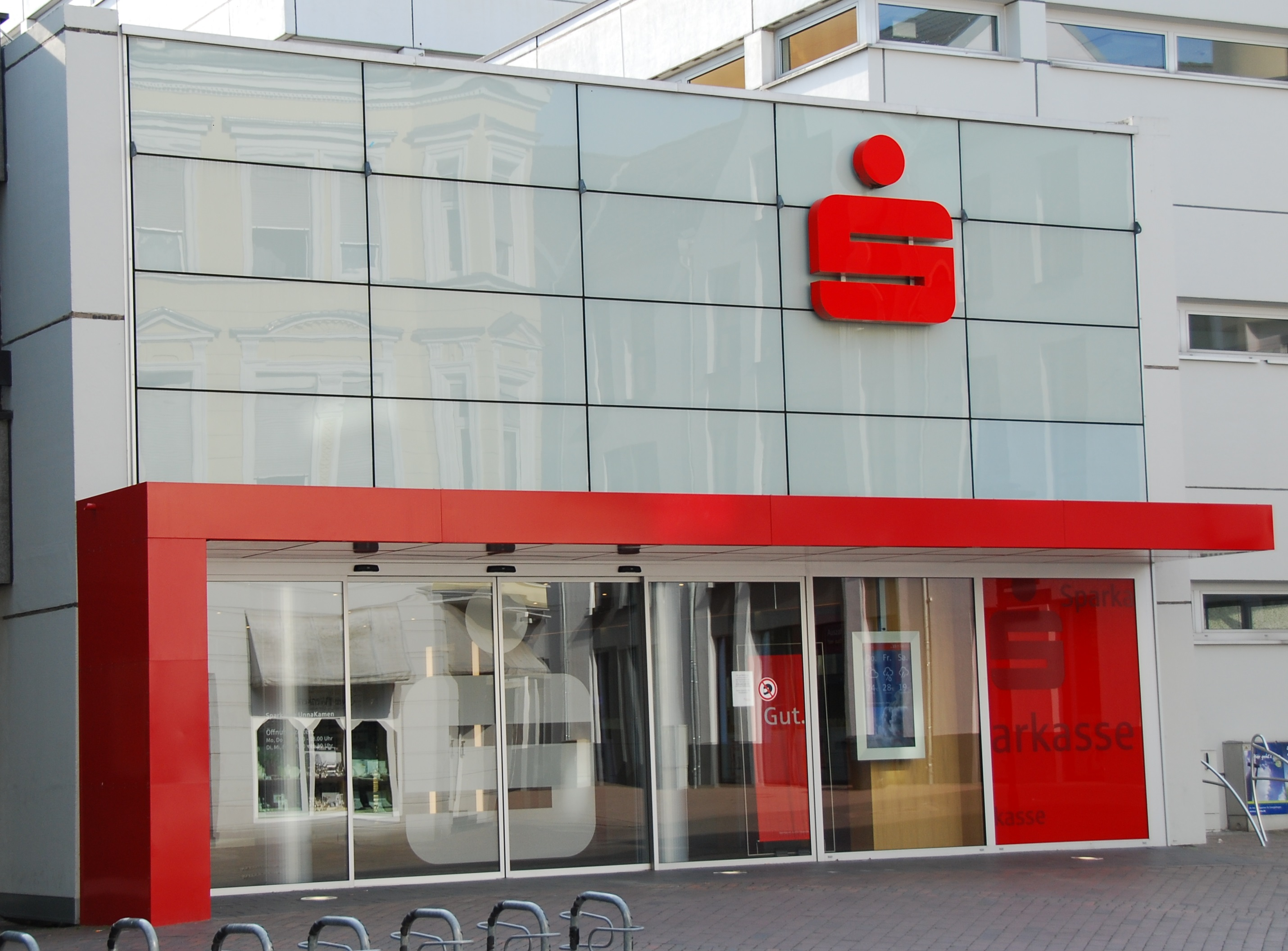 Hauptstelle in Unna, Bahnhofstraße 37